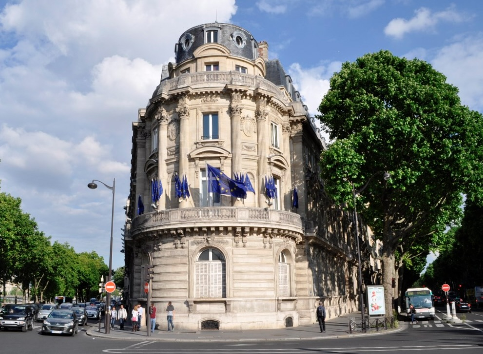 Extrémité du boulevard Saint-Germain, immeuble du 288 où est mort Louis Blériot, et qui héberge, à la date de cette photo, la représentation en France de la Commission européenne.